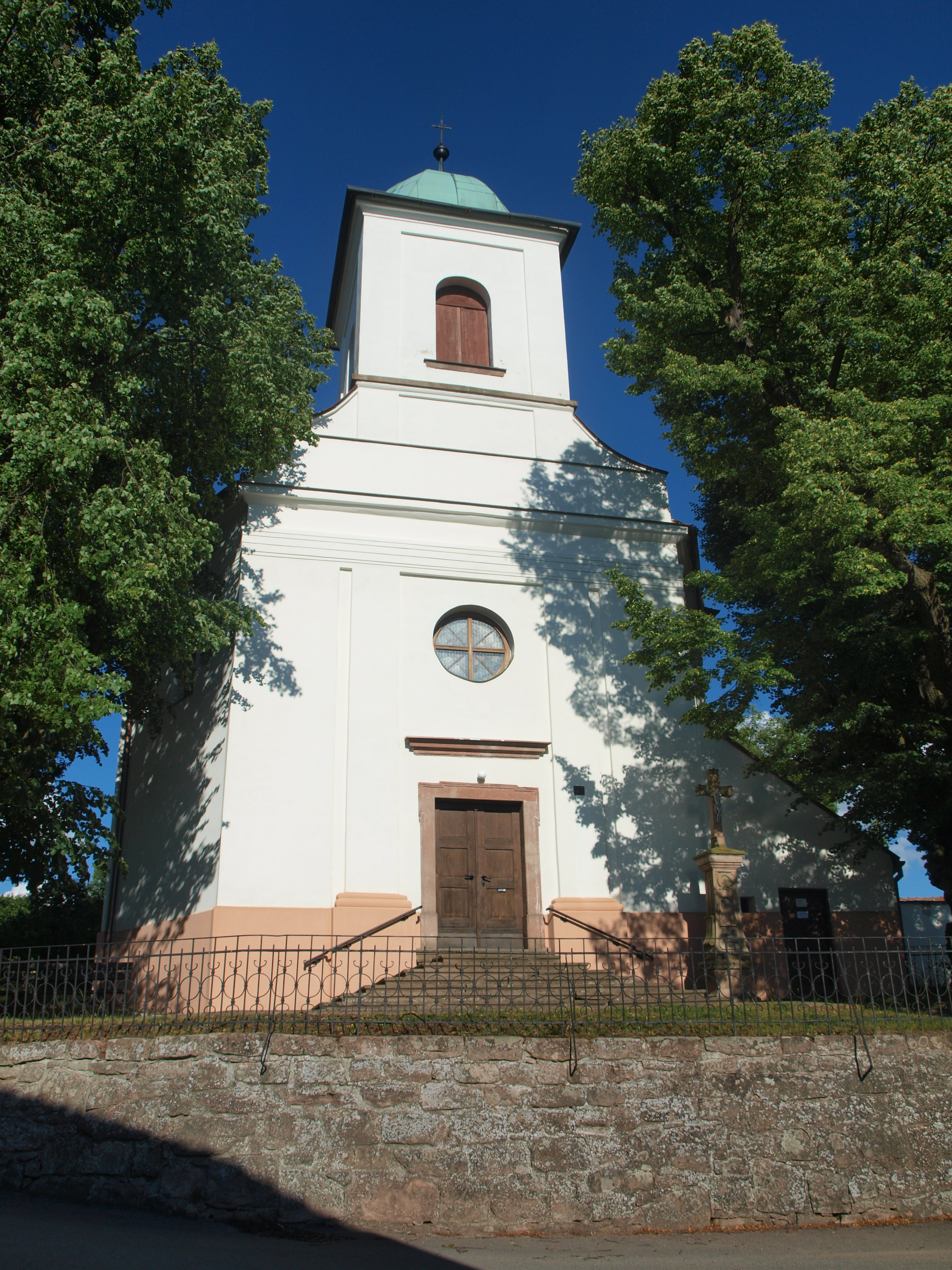 Kostel svatého Petra a Pavla v obci Unín v okrese Brno-venkov